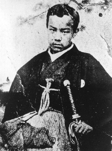 松平喜徳の肖像写真。